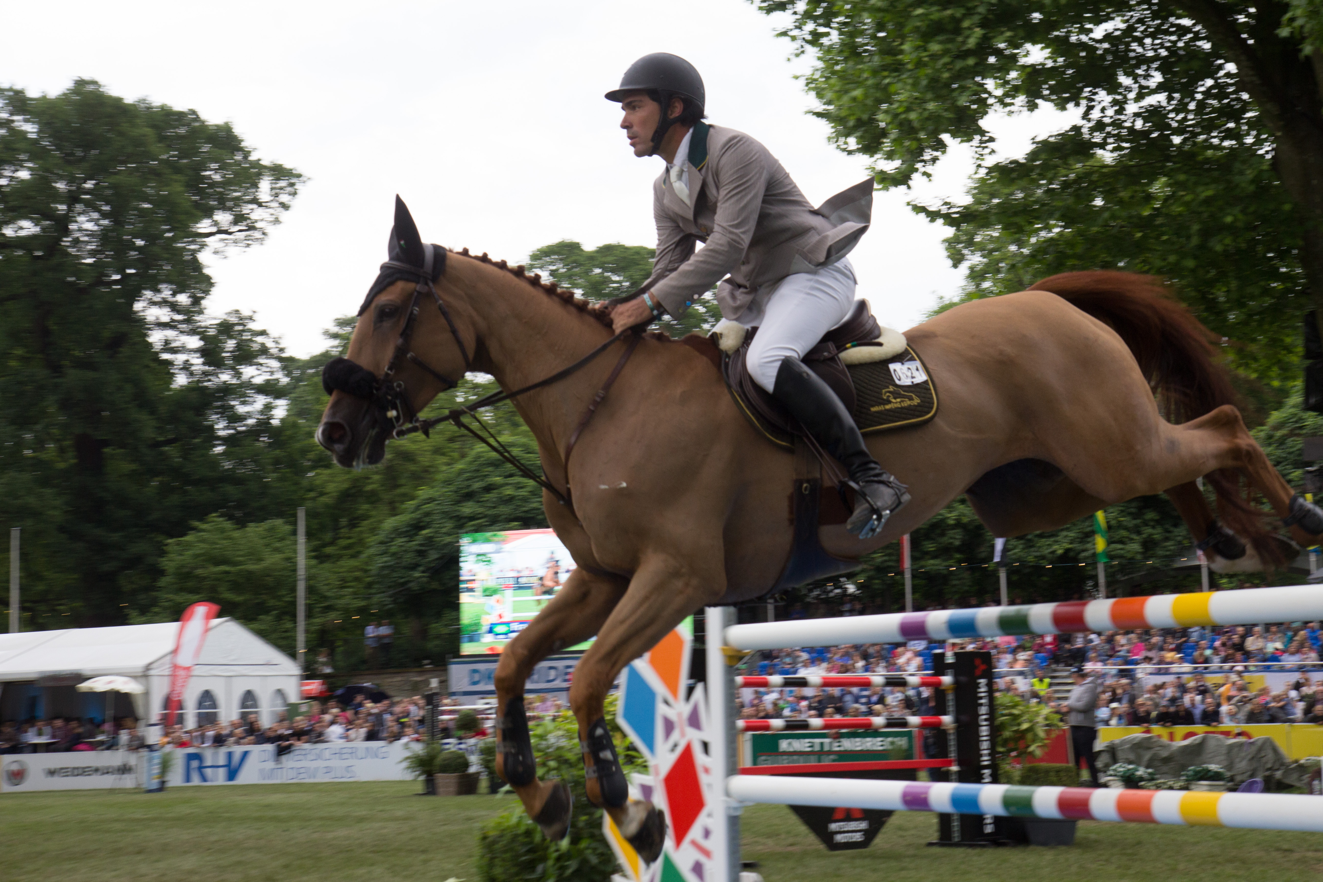 Internationales Wiesbadener Pfingstturnier 2018. CSI 4* Springprüfung KI.S *** m. Stechen (1,50m) "Preis des Hessischen Ministerpräsidenten": Francisco José Mesquita Musa auf Sharapova